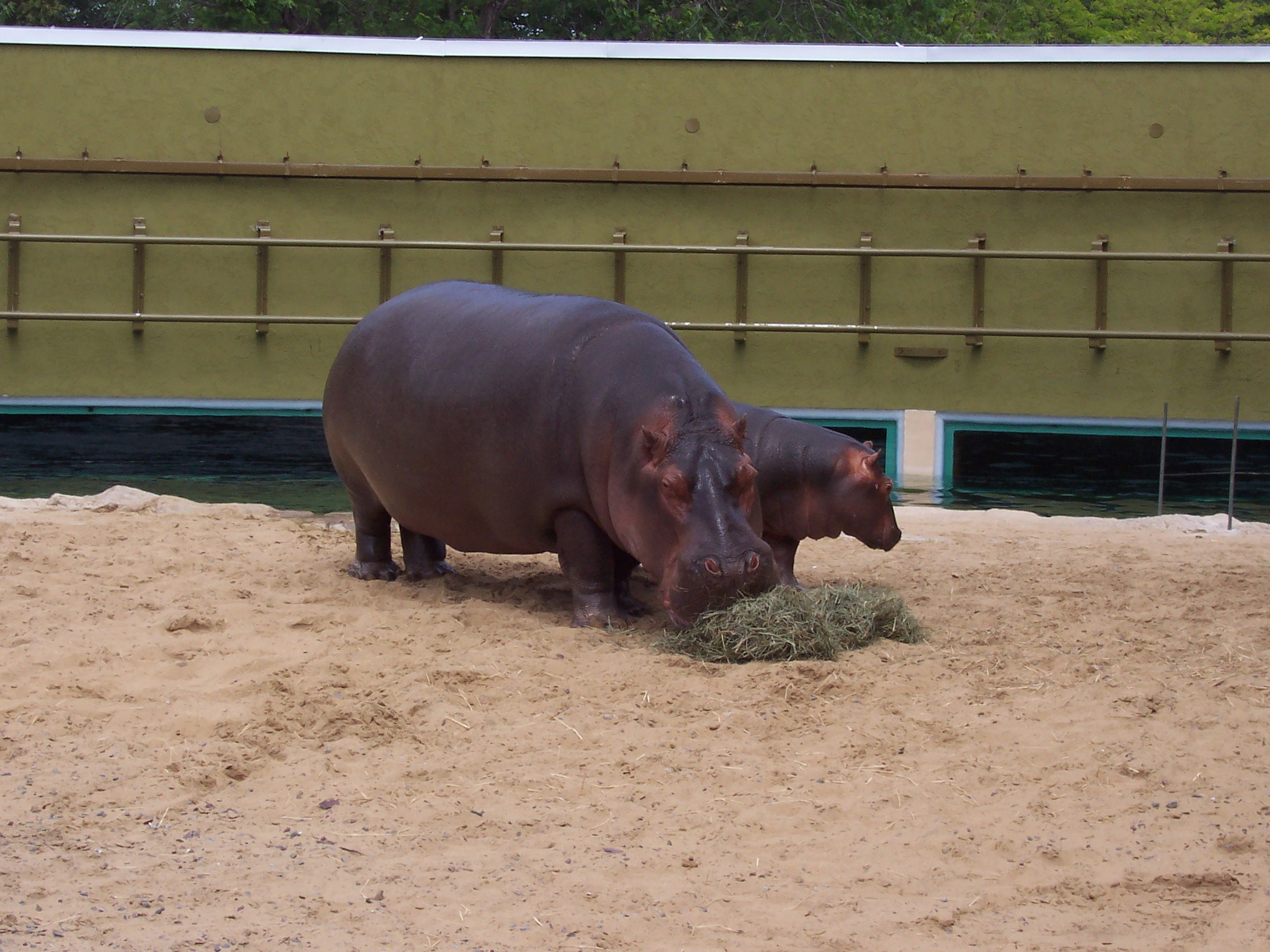 Zoo de Granby (Québec, Canada): Hippopotames; Granby Zoo (Quebec, Canada): Hippos